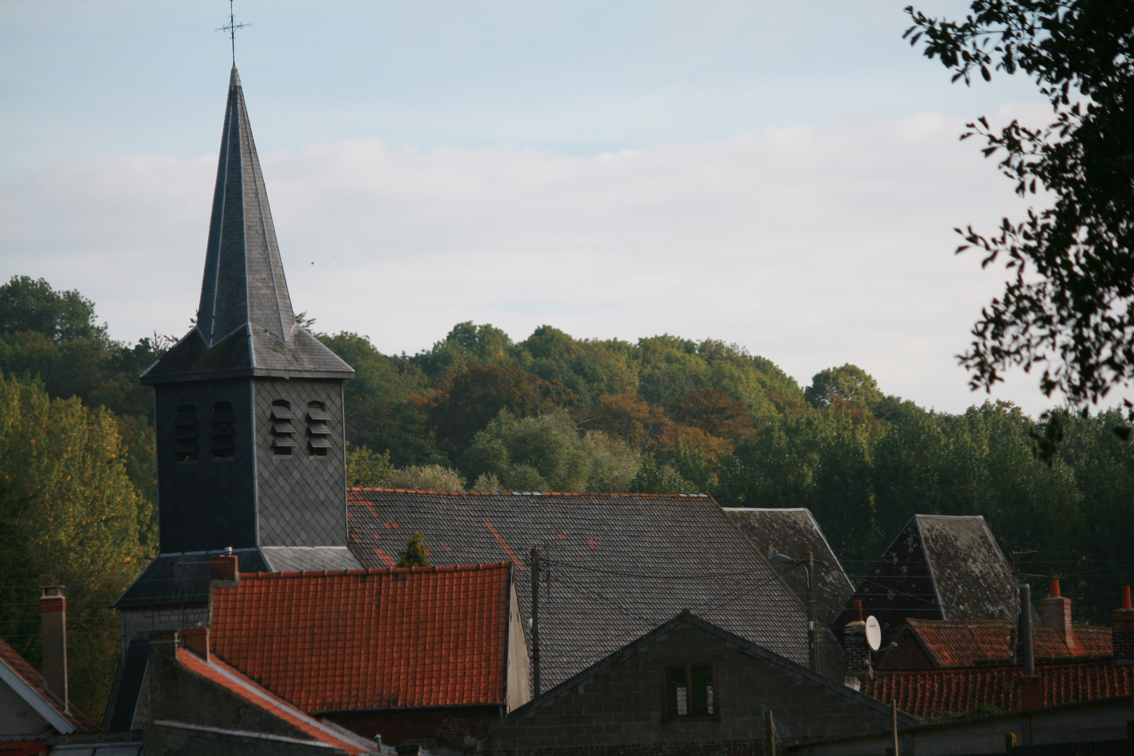 Photo de l'église dâtant du XVeme, bâtie entièrement en pierres et chaux du pays elle est à trois nefs, sous un toit unique, prolongé par trois chapelles.